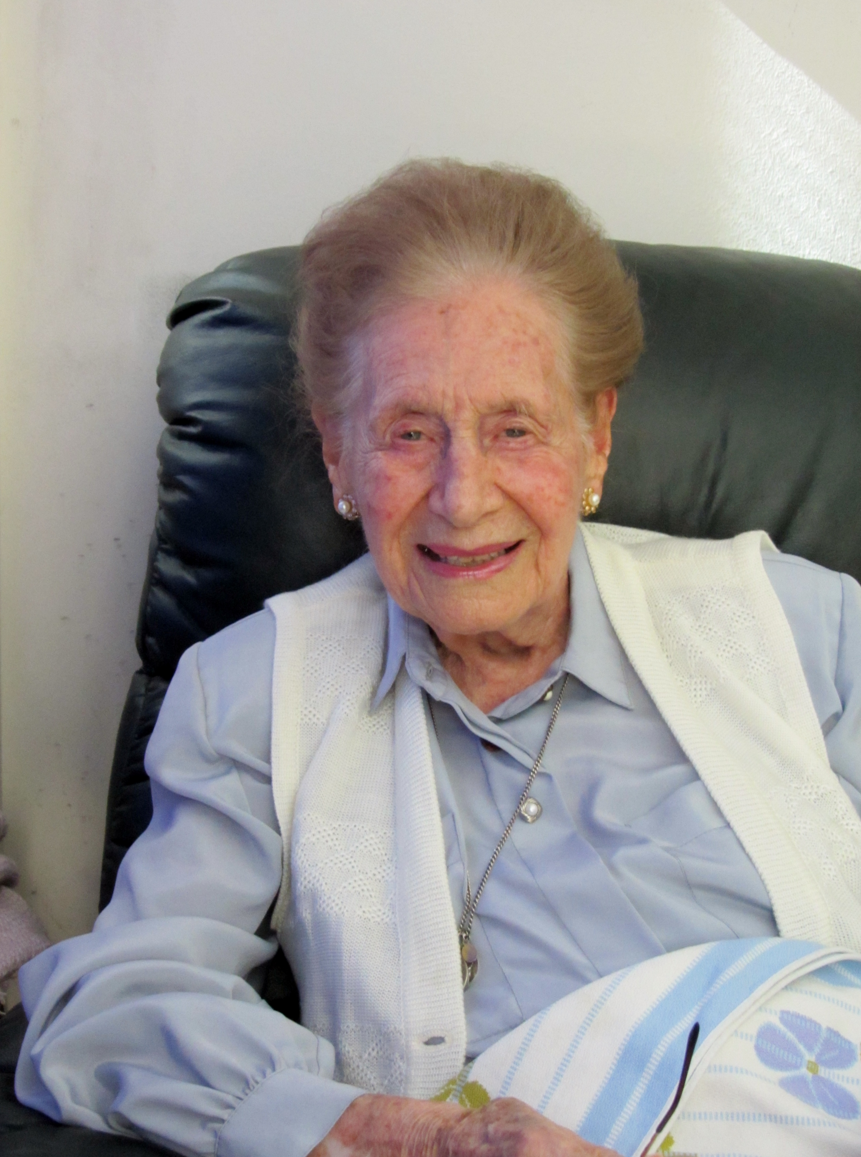 La exministra de Justicia de Chile Adriana Olguín a los 101 años